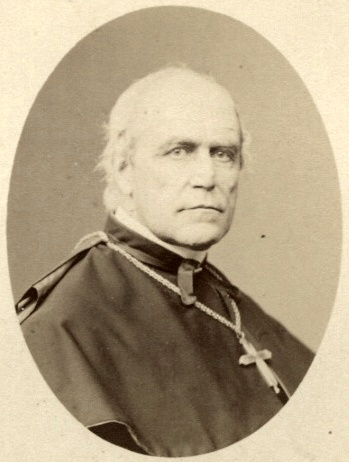 Wilhelm Emmanuel von Ketteler, Bischof von Mainz